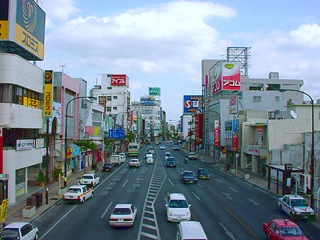 National Route 330, Okinawa, Okinawa.